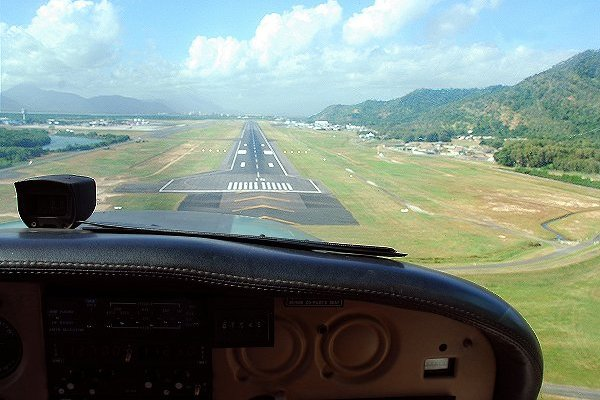 Aéroport International de Cairns approche piste 15